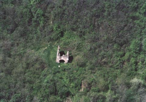 Szentbékkálla, Hungary, aerialphotography